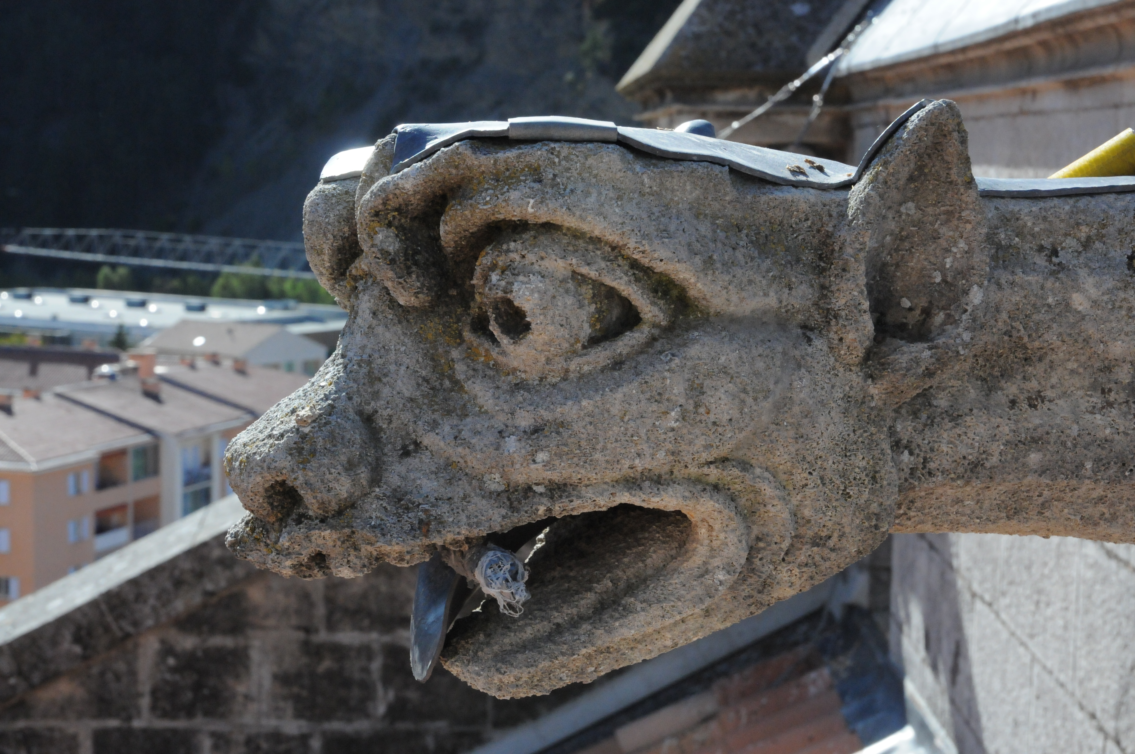 Détail d'une gargouille de la Cathédrale Saint-Jérôme à Digne-les-Bains - Alpes de Haute-Provence .